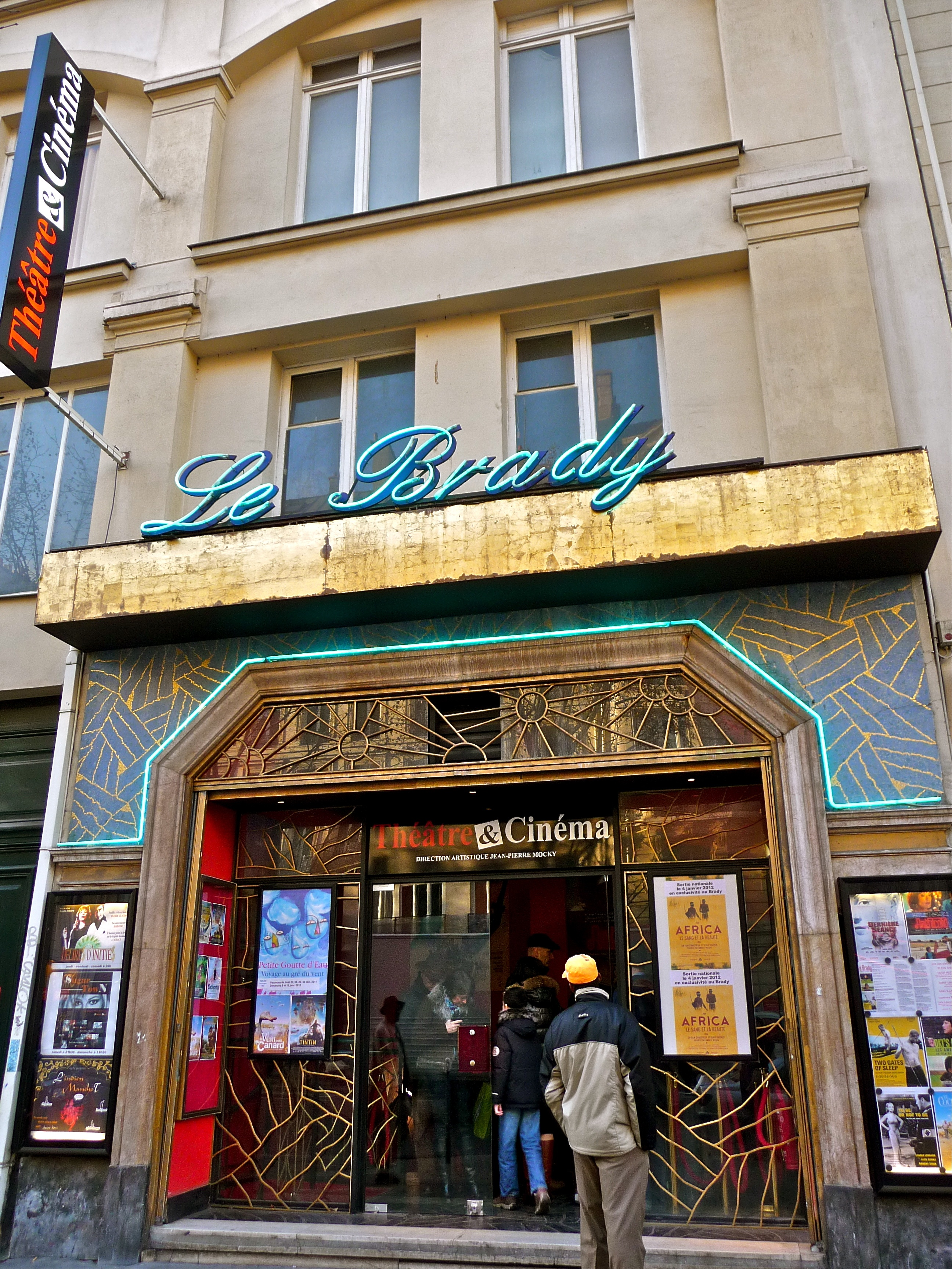 Cinéma Le Brady Cinema & Théâtre - 39, bd de Strasbourg.